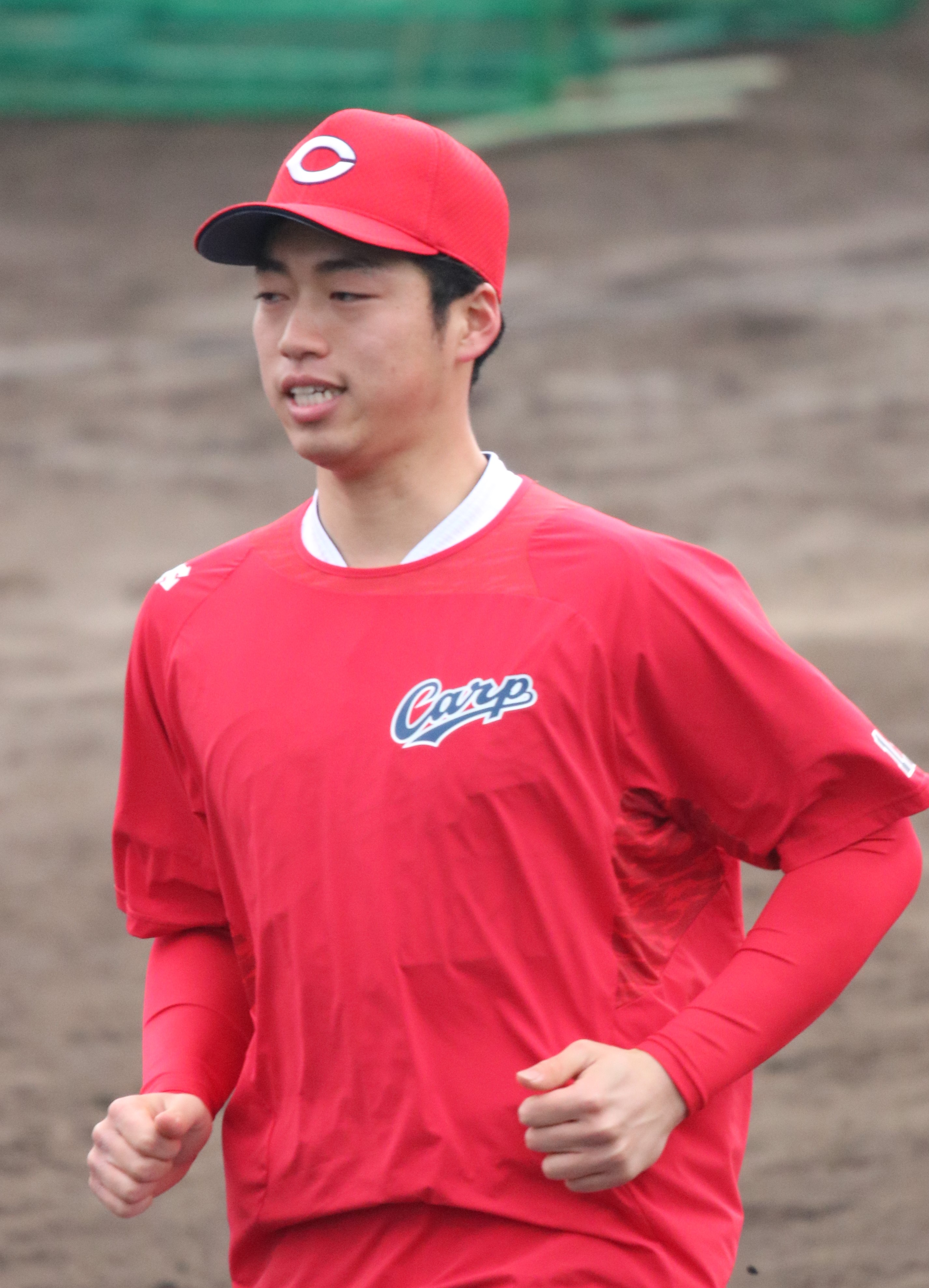 2018/2/8東光寺球場